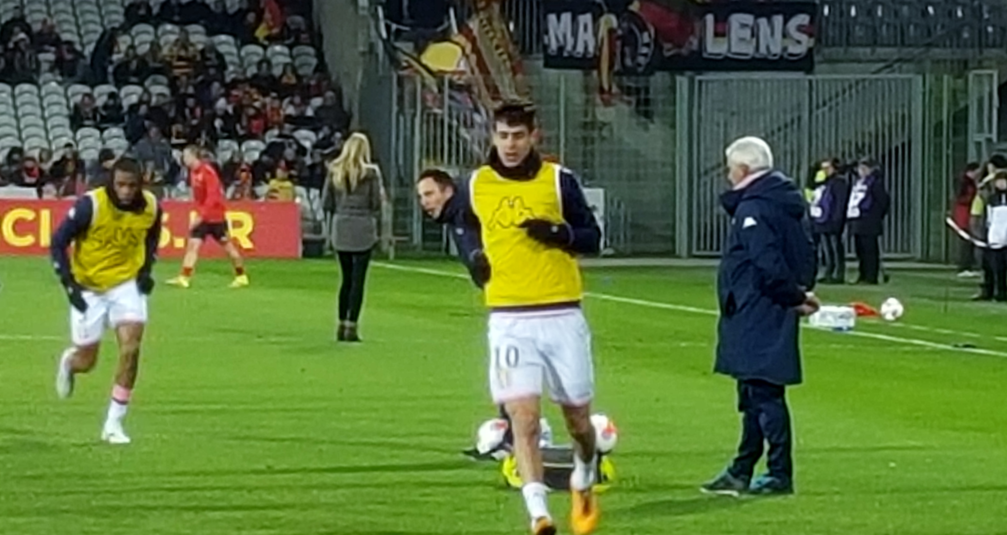 Kévin Hoggas avant le match RC Lens / Evian TG, comptant pour la vingt-huitième journée du Championnat de France de football de Ligue 2, le 29 février 2016, au Stade Bollaert Delelis